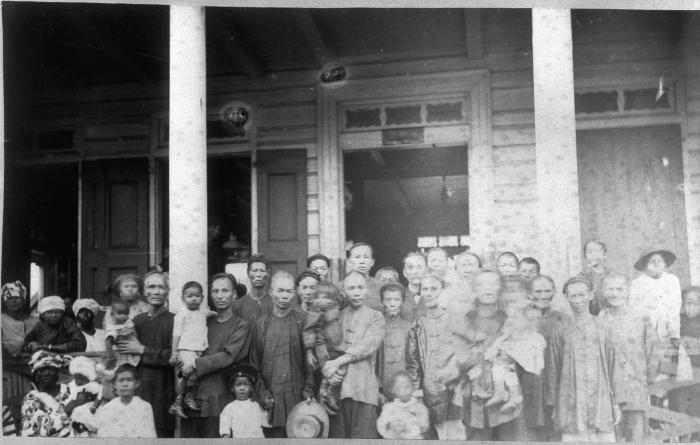 Foto. Suriname, een groep voornamelijk Chinese mannen, Creoolse vrouwen poseren met hun kinderen.